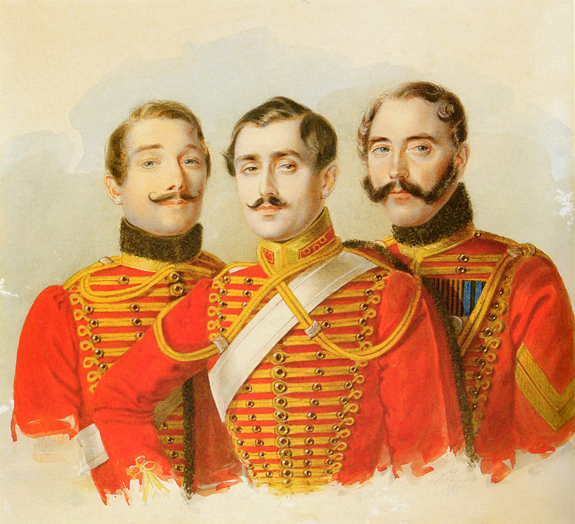 Унтер-офицеры Лейб-гвардии Гусарского полка